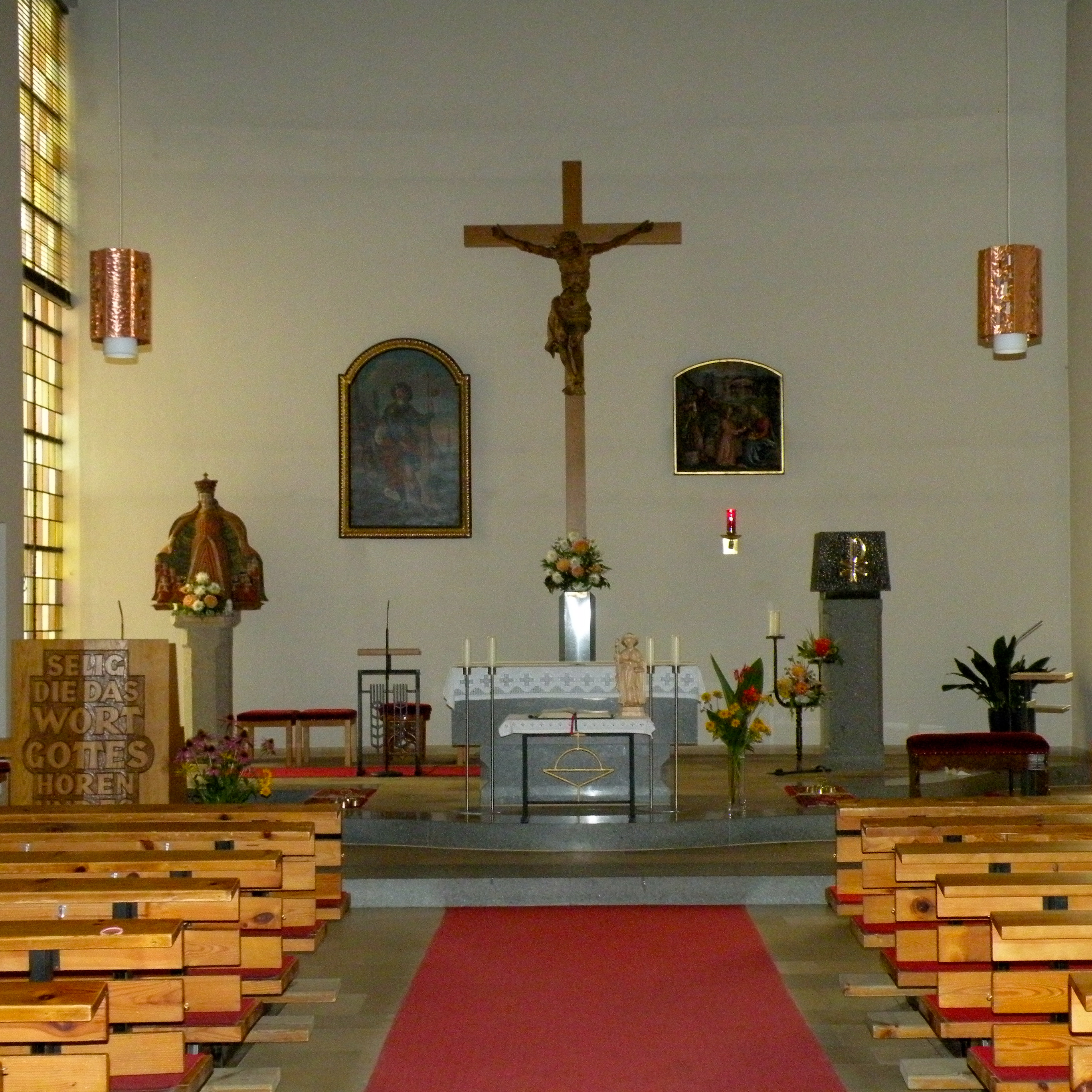 Kath. Pfarrkirche Hl. Jakobus